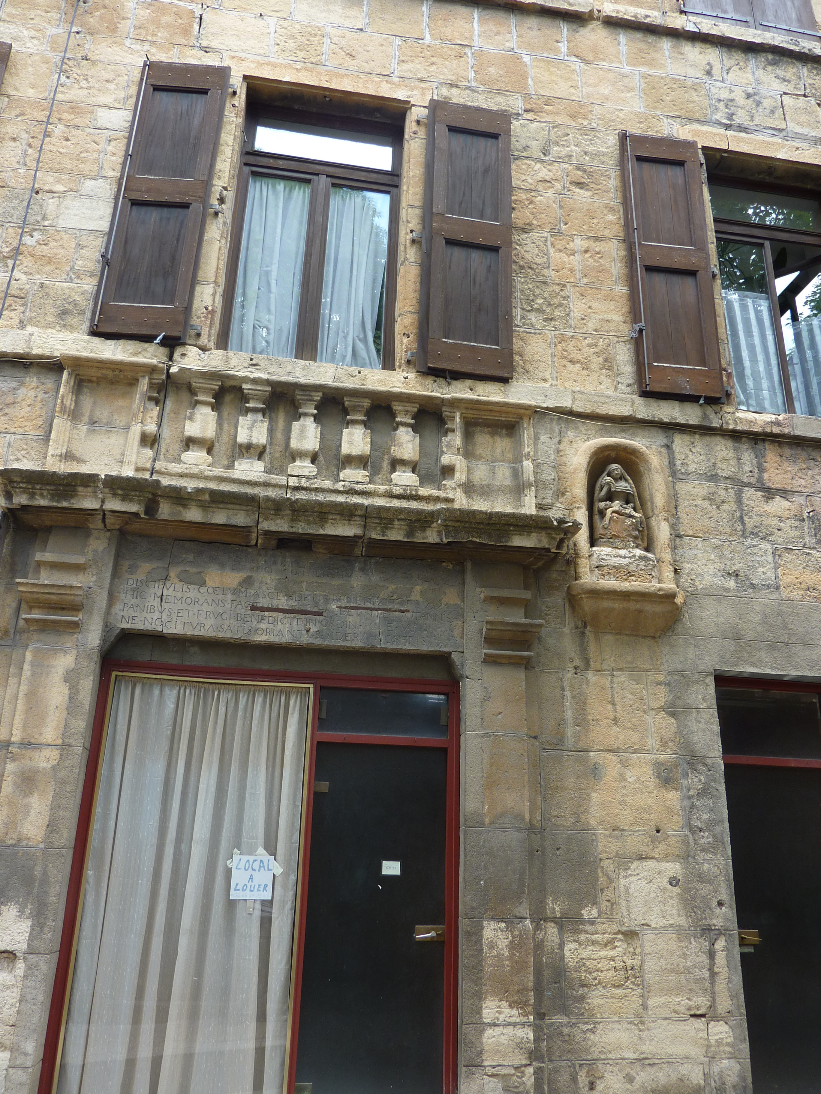 Mende (Lozère, France) : la maison de Louis Mandrin (?).